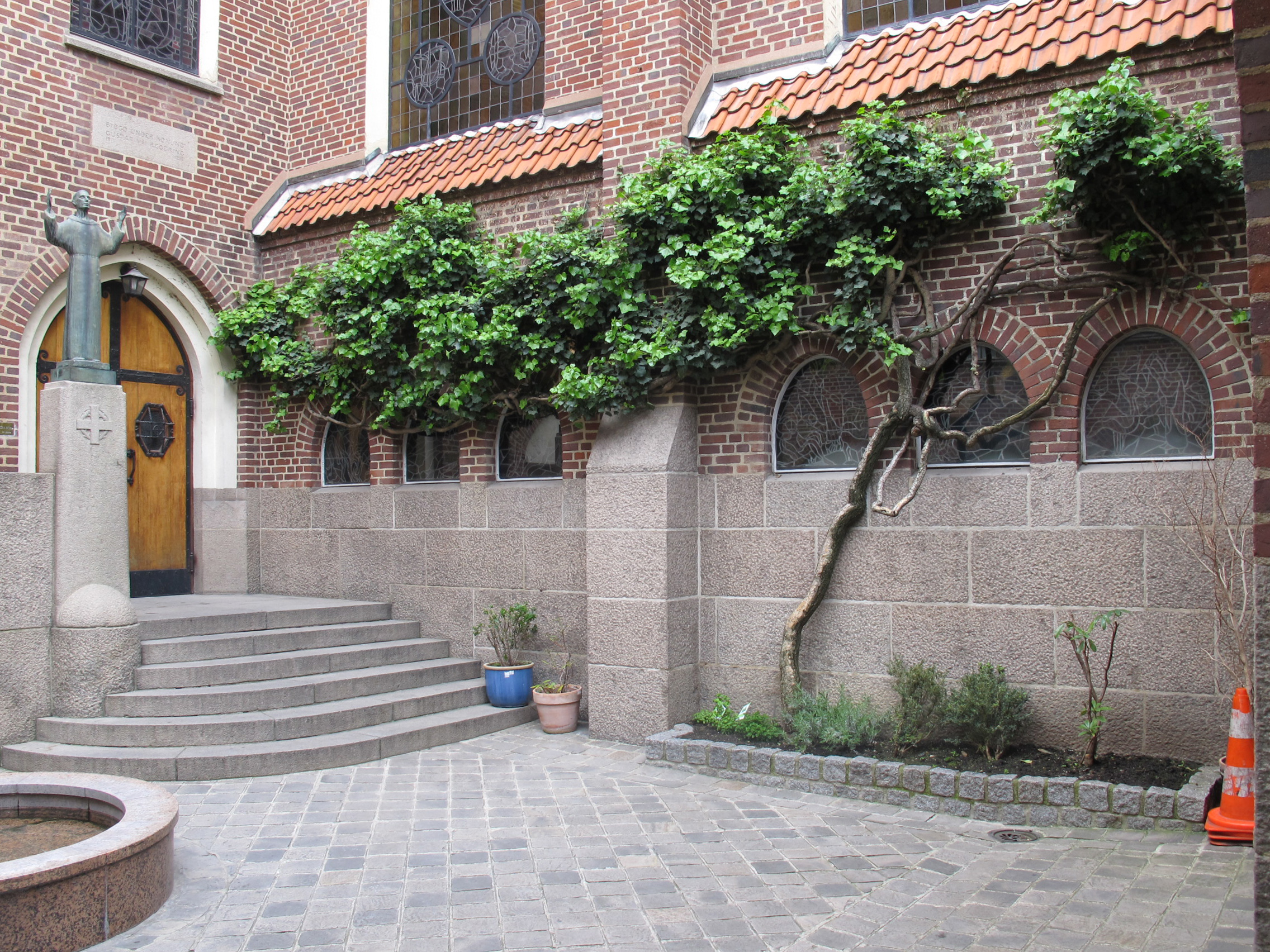 Église suédoise de Paris, Rue Médéric